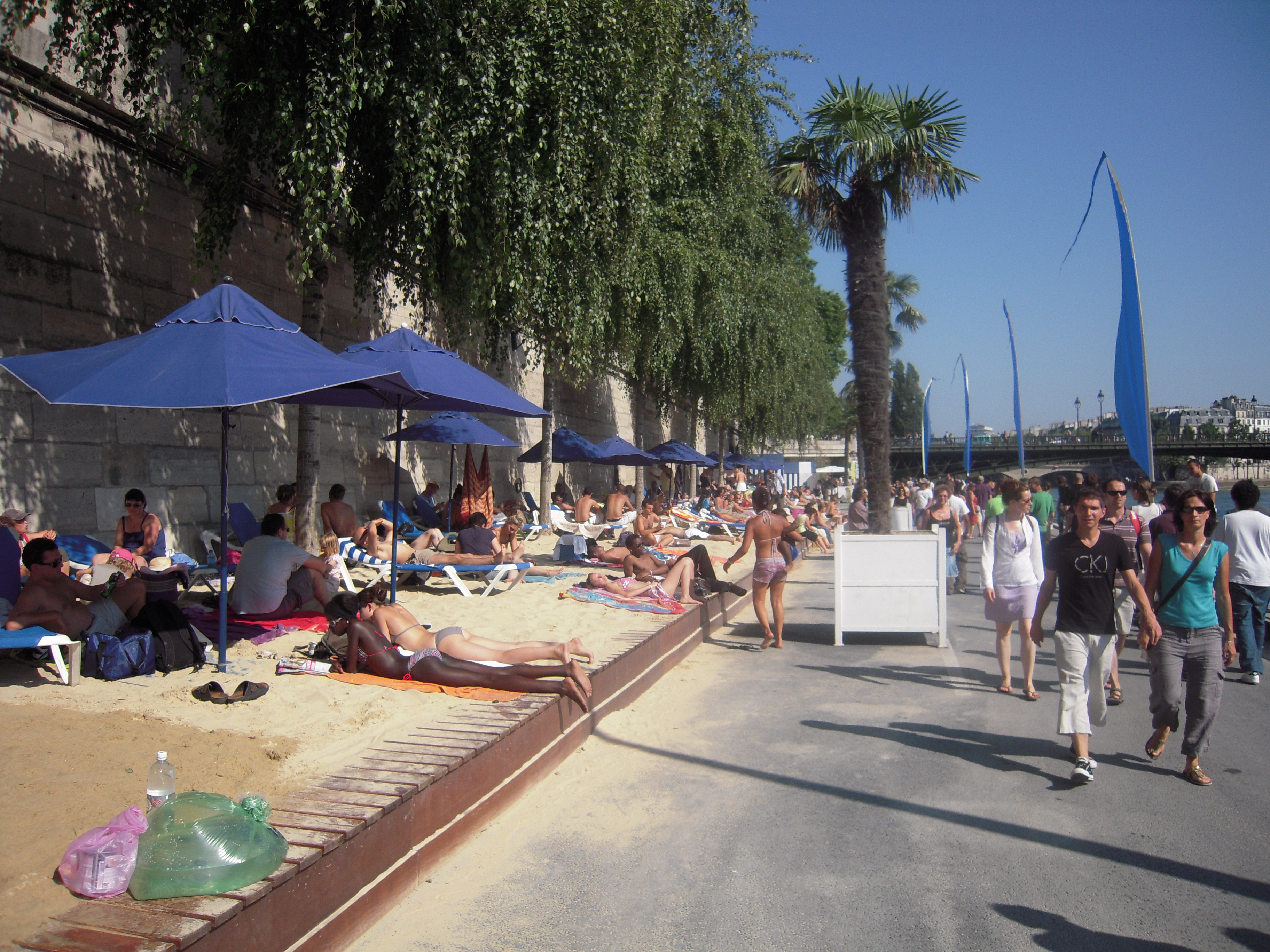 Redécouvrez les quais de seine transformés en lieu de villégiature pour franciliens. Paris Plages 2009.